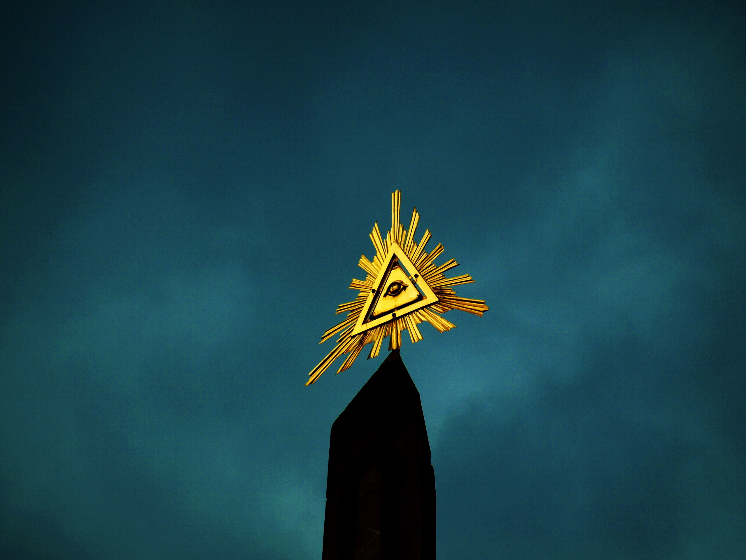 Boží oko